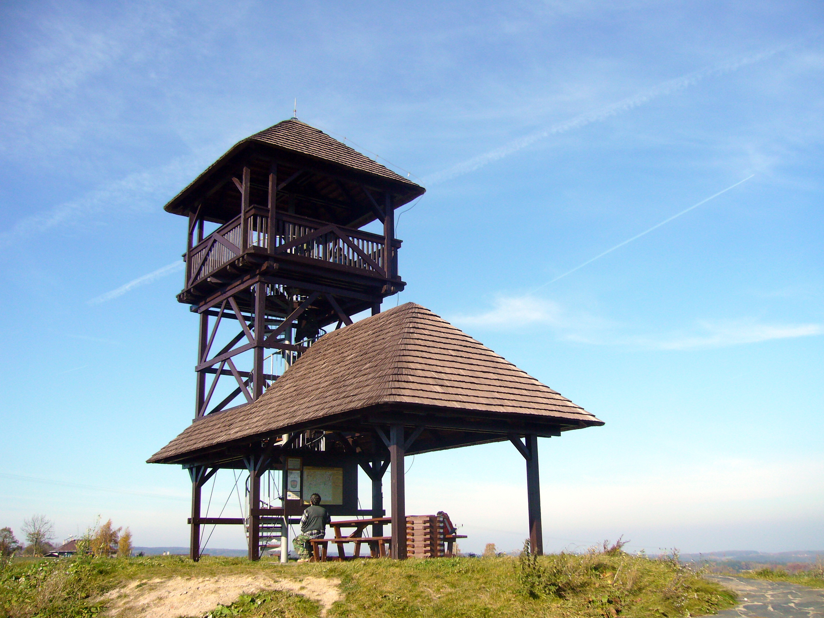 Oppidum, Hradiště, rozhledna BoikaHradiště (České Lhotice).